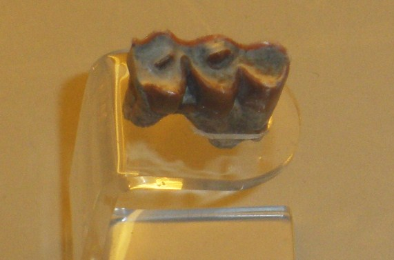 Fossil of Gazella, an extinct mammal - Took the picture at Museo di Paleontologia di Firenze